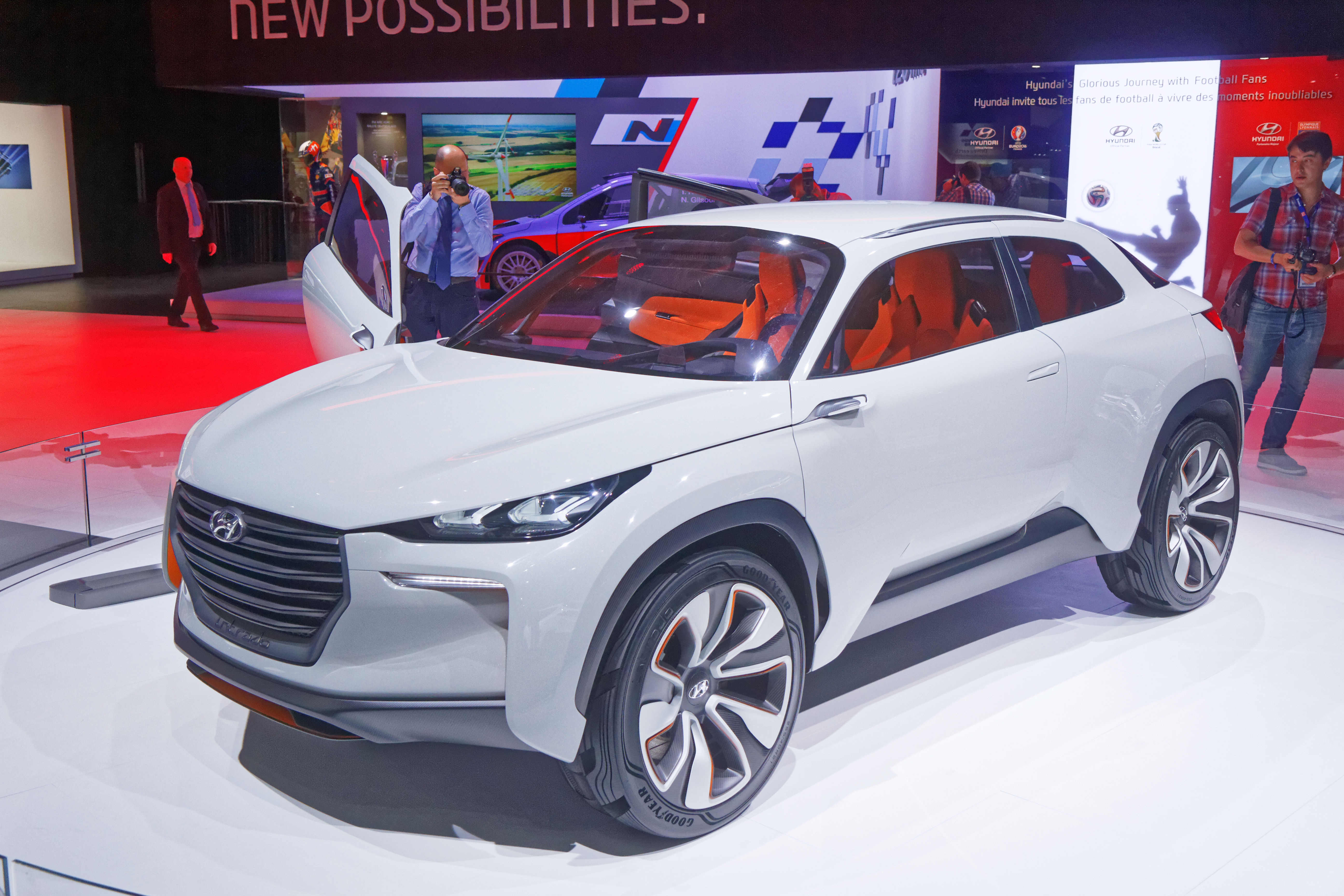 Une Hyundai Intrado présentée lors du mondial de l'automobile de Paris 2014.